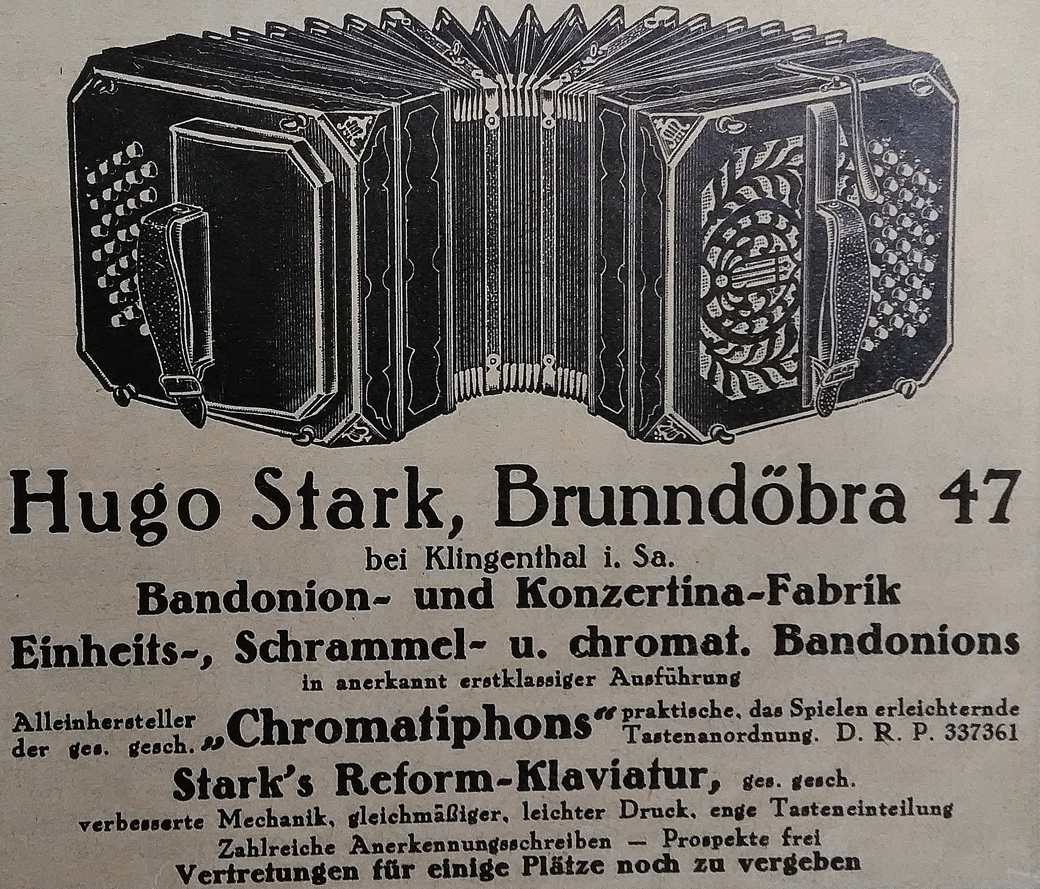 Fabrica de bandoneones y concertinas Hugo Stark, Klingenthal, Alemania.